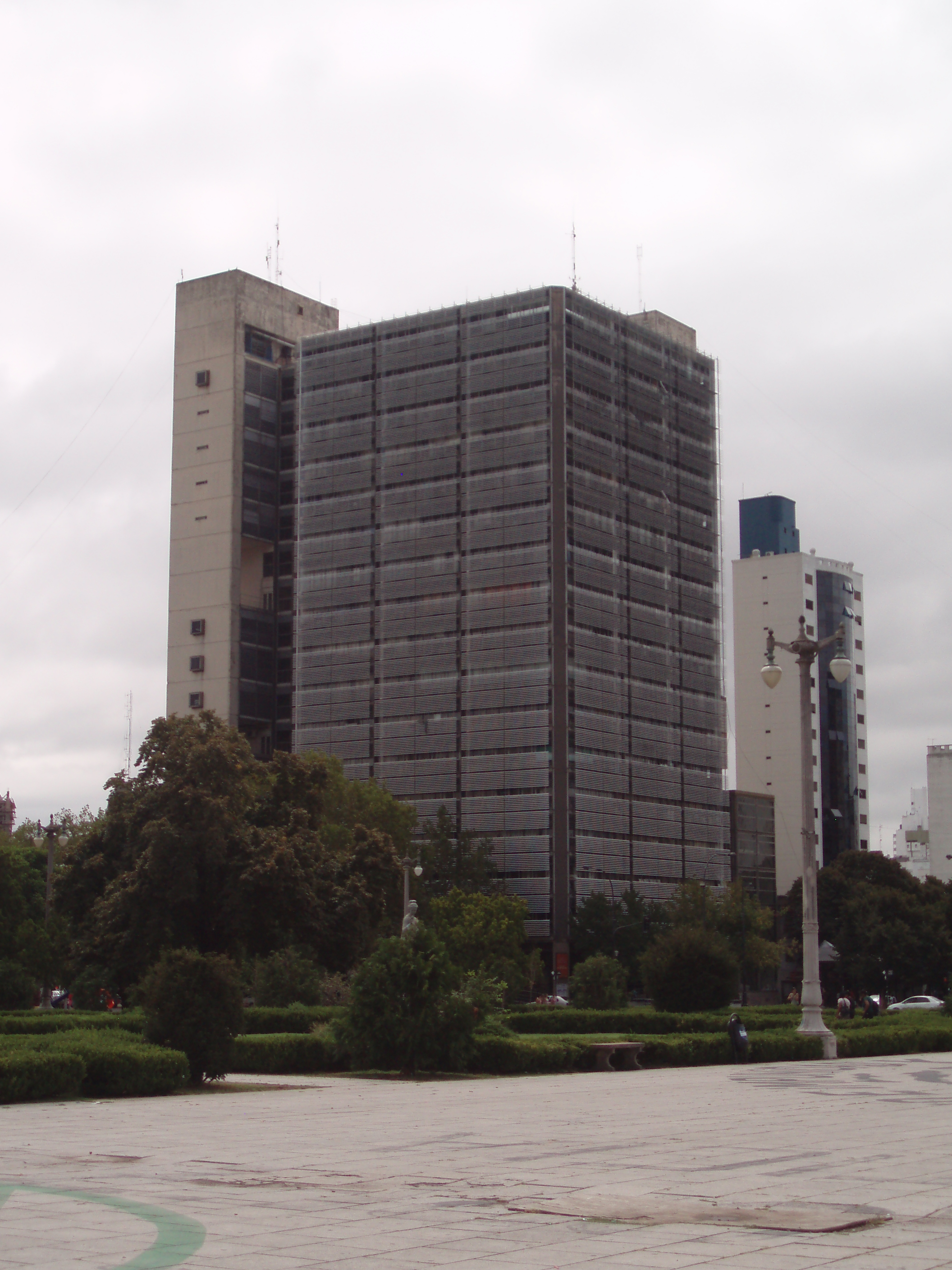 Torre 1 del Centro Administrativo Gubernamental de la Provincia de Buenos Aires. Ciudad de La Plata, Argentina.